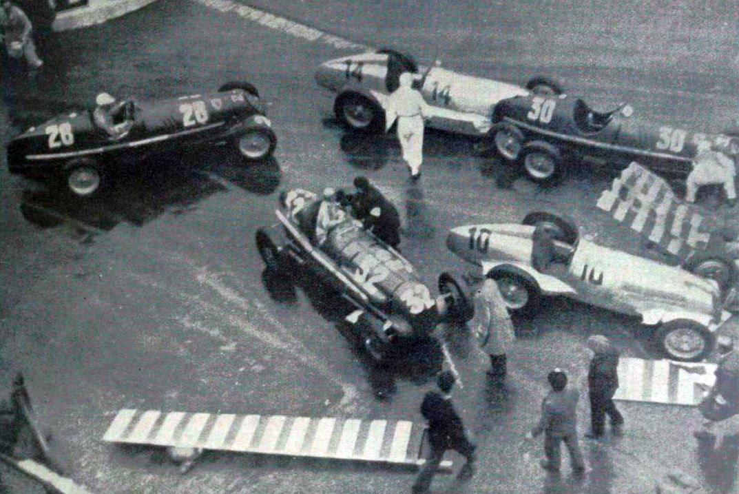 Grand Prix de Monaco 1936, carambolage à La Chicane sous la pluie (G. à D. Tadini, Trossi, von Brauchitsch, Farina et Chiron).